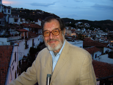 José Solé en la actualidad